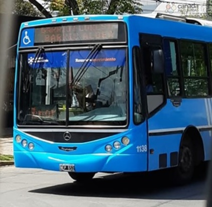 Mercedes-Benz operando la línea Enlace Noroeste, de la empresa Movi